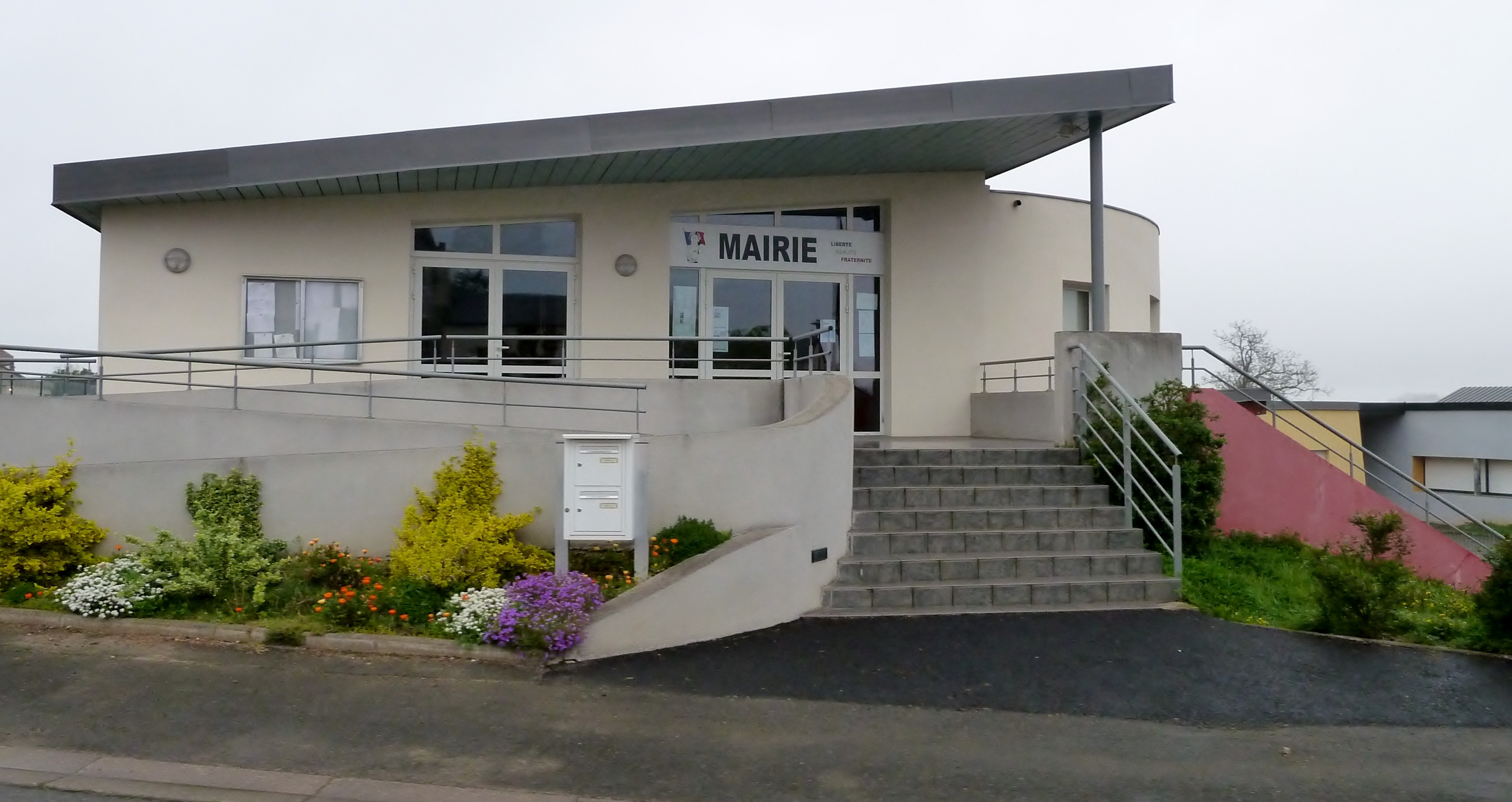 Mairie d'Eslourenties-Daban